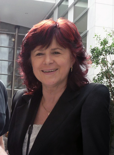 MEP Monika SMOLKOVA, Slovakia